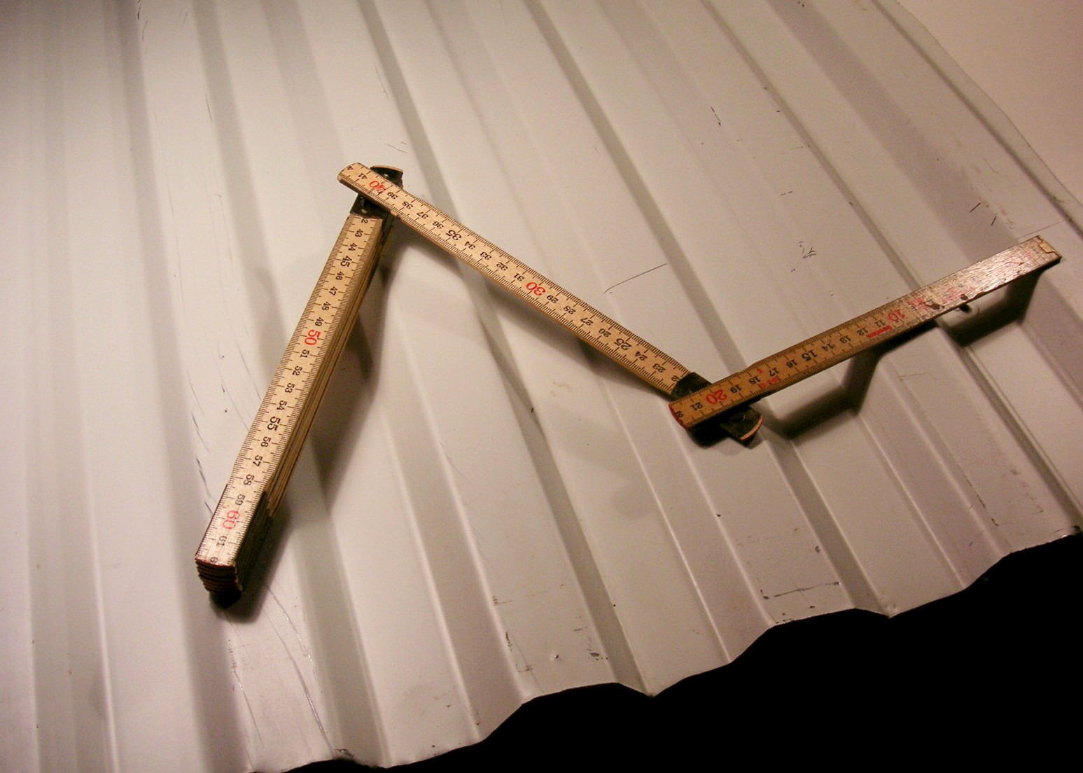 Trapezkorrugerat plåt